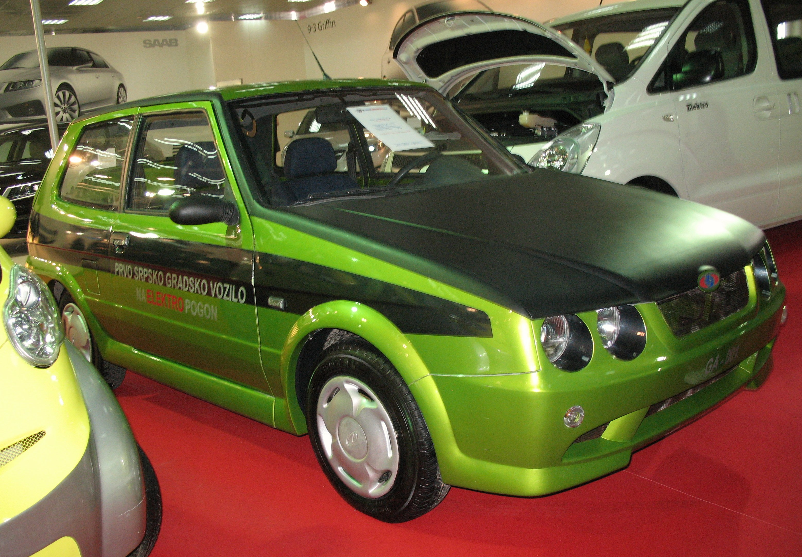 Srpski (latinica): Глобус Ауто 001